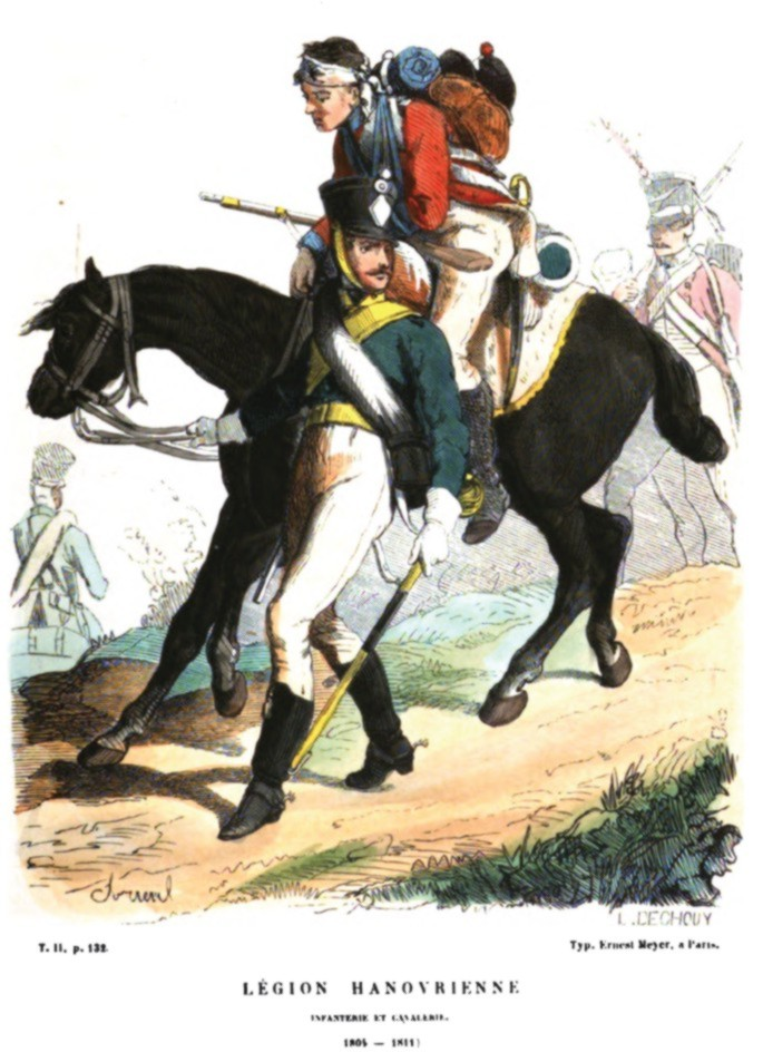 Légion Hannovérien der Grande Armée (um 1810)